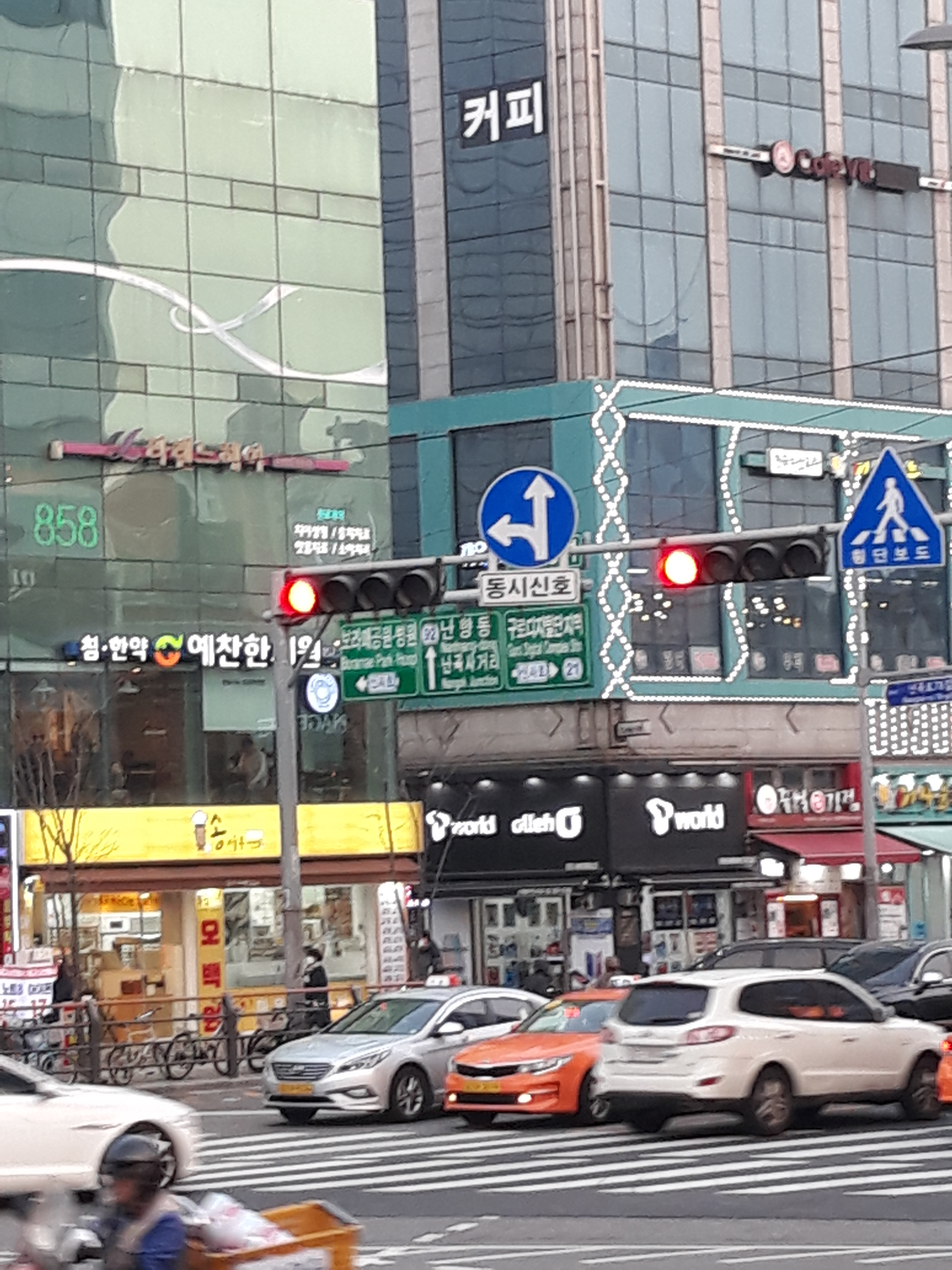 신대방역사거리에서 바라보는 난곡로 가는 방향